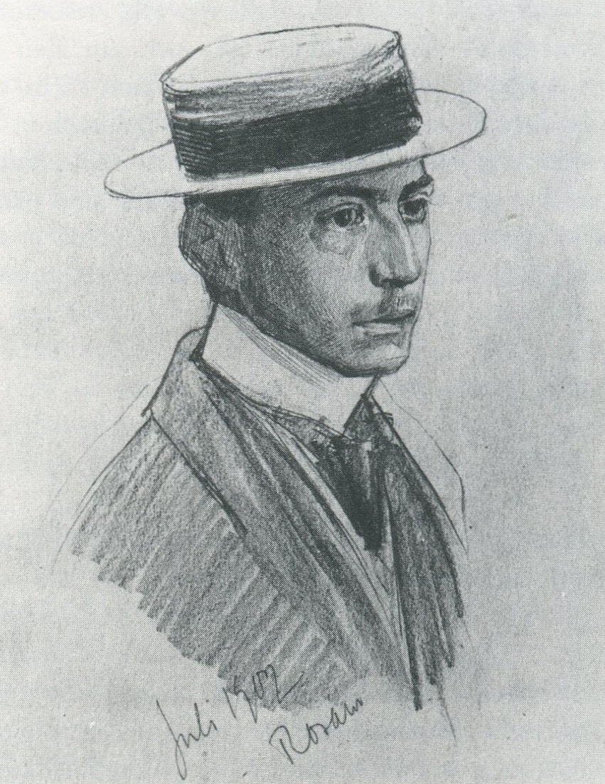 Porträt Walter A. Rosam (Maler), Zeichnung von Franz Nölken